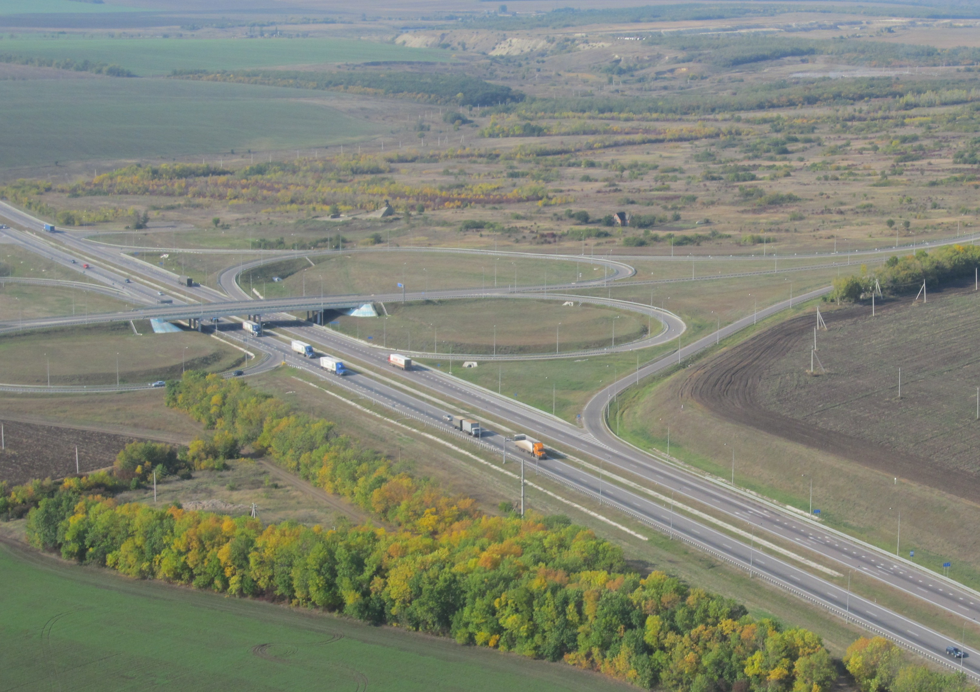 Федеральная трасса М4 "Дон" (развязка на Луганск)